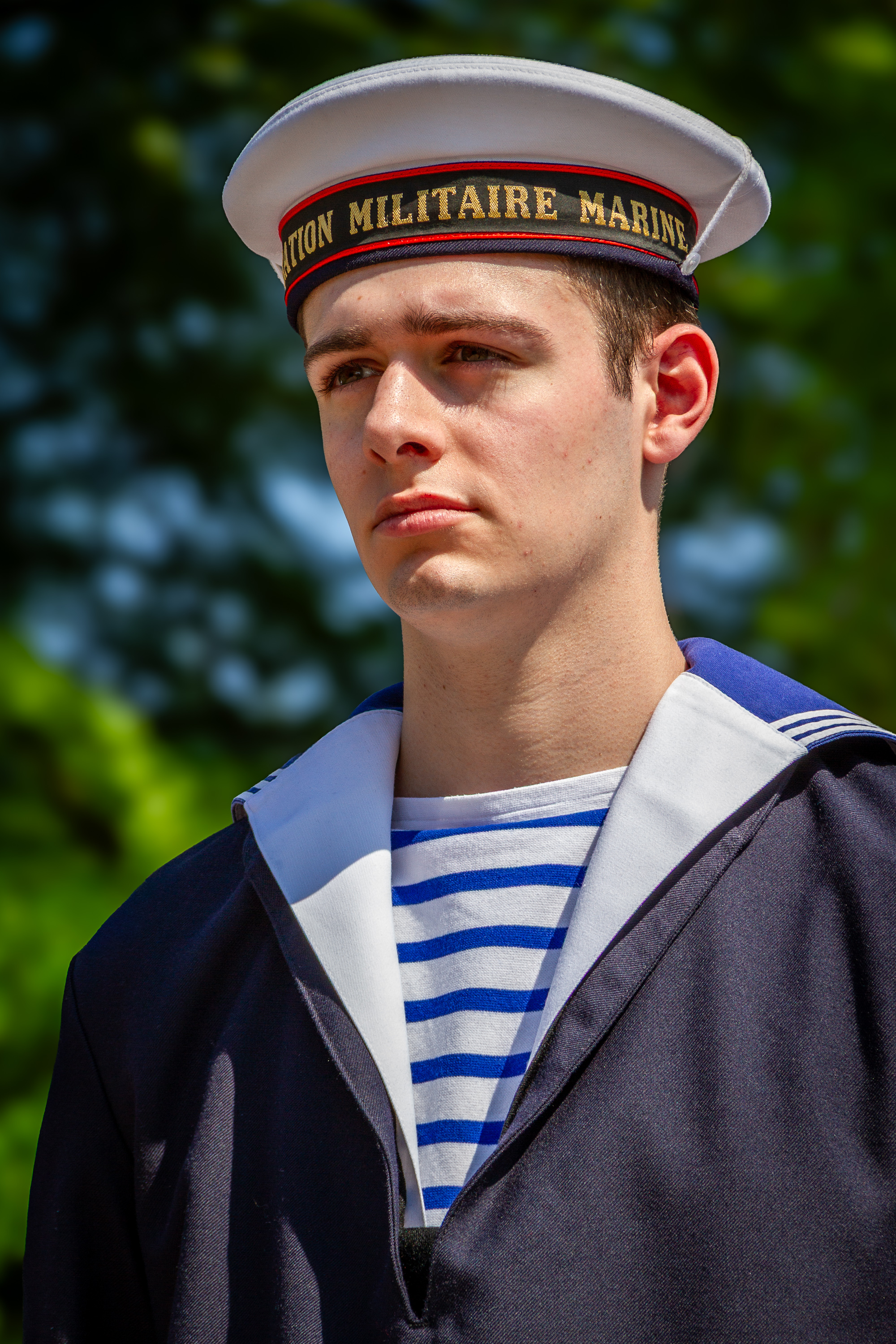 Cérémonie commémorative du 8-mai-1945 Strasbourg, place de la République 8 mai 2013